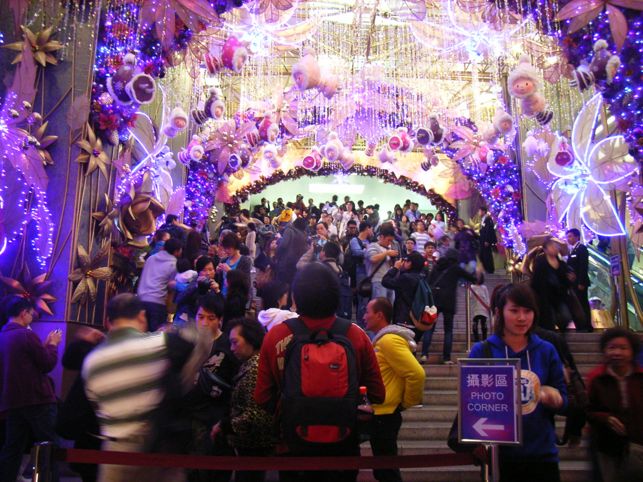 尖沙咀海港城2009年聖誕節